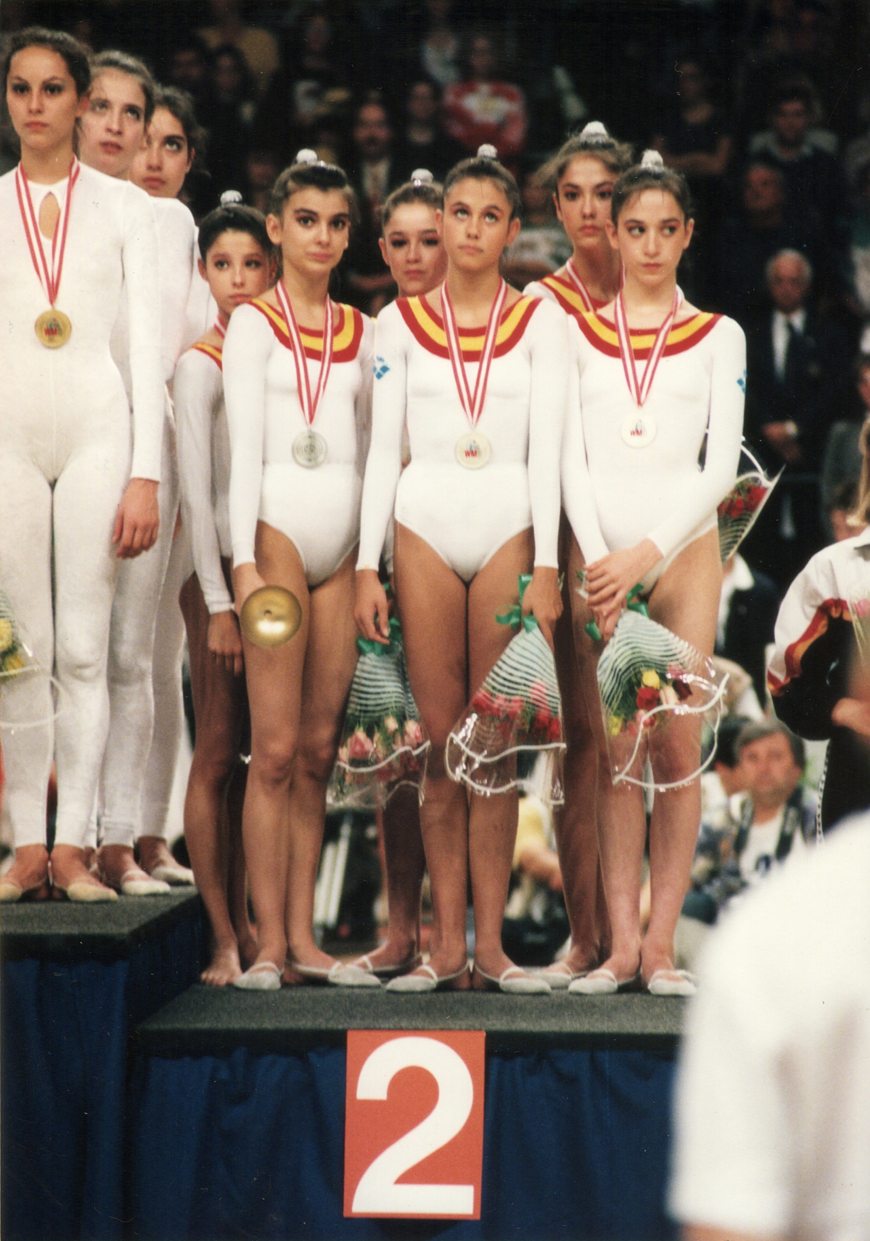 Conjunto español en el podio de 5 aros en el Campeonato Mundial de Gimnasia Rítmica de 1995 en Viena.